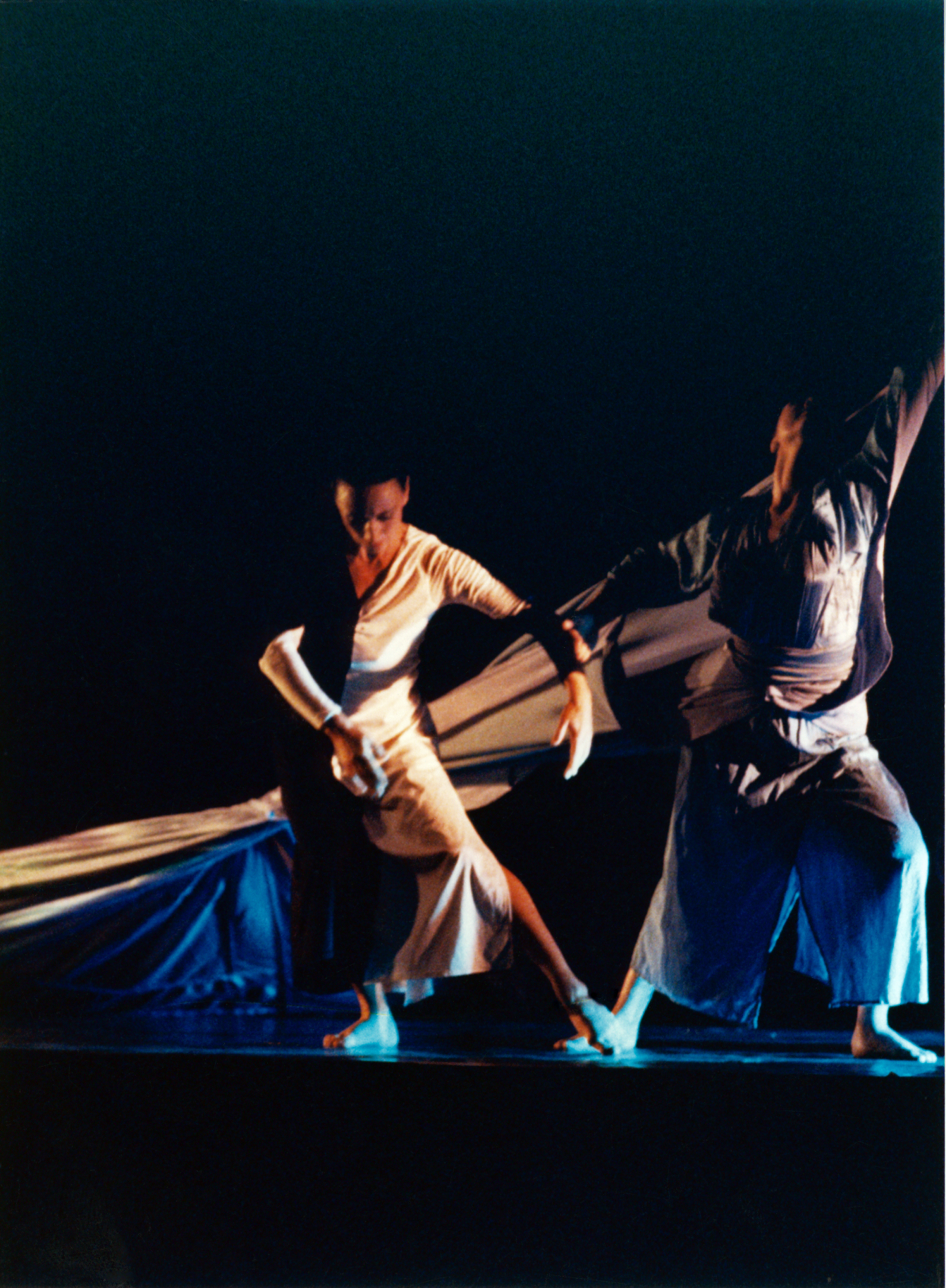 "Shanthi" nach einem Gedicht von T.S. Eliot Tänzerinnen: Immo Buhl, Lará Buhl Choreographie: Immo Buhl Musik: Sue Thorp Sprache: Sue Armstrong